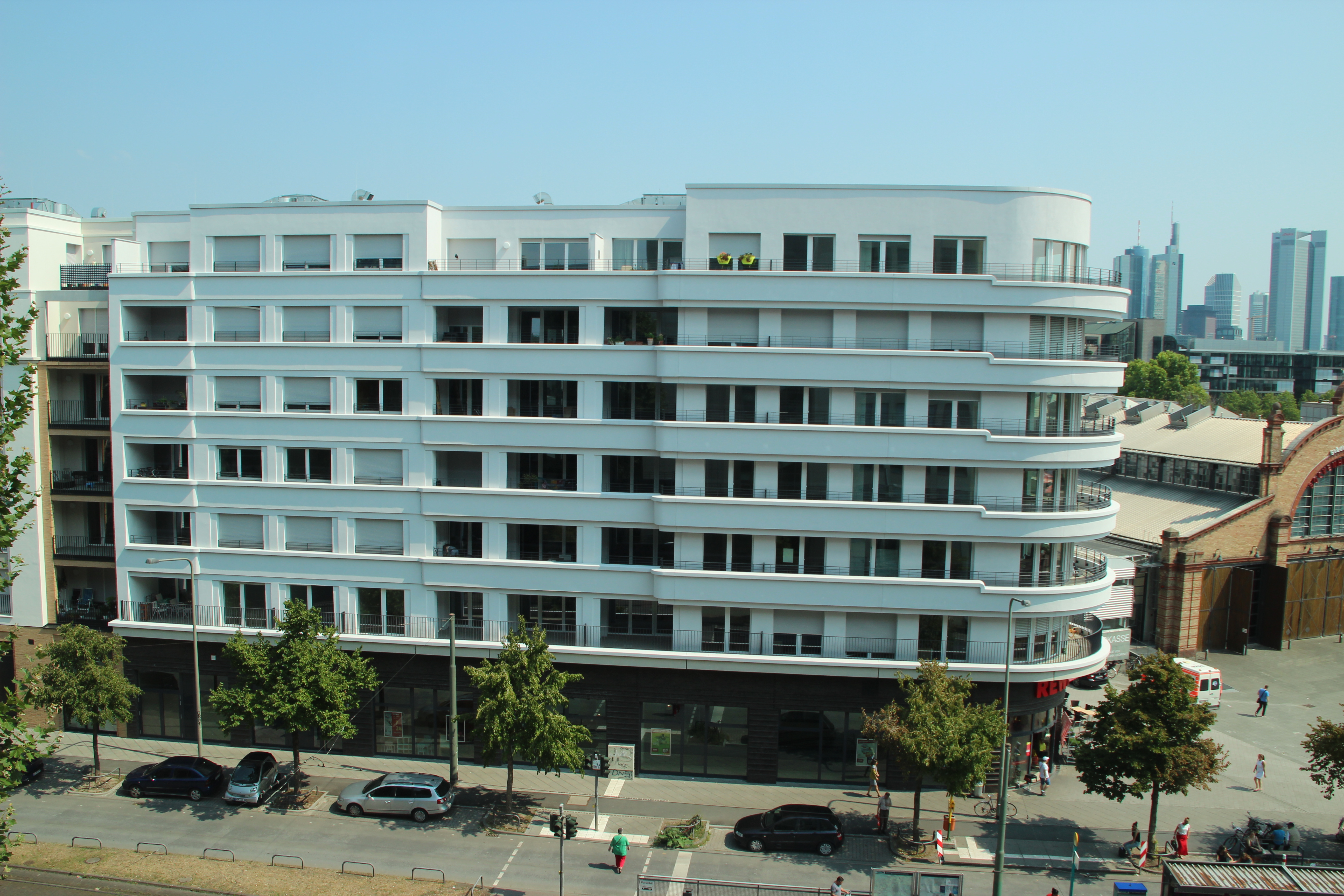 Bildinhalt: Gebäudekomplex "Wohnen am Depot" von der Gräfstraße aus gesehen. Im Erdgeschoss ein Lebensmittelmarkt, darüber Wohnungen. Rechts am Rand das Bockenheimer Depot, dahinter die Frankfurter Banktürme. Aufnahmeort: Frankfurt am Main, Deutschland